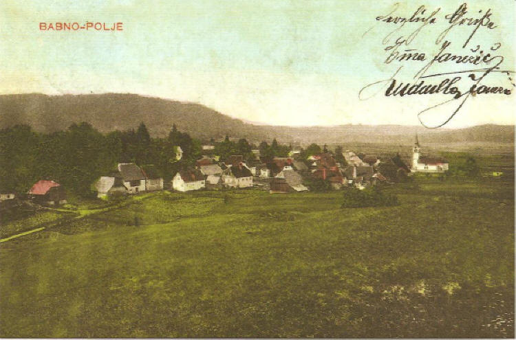 Razglednica prikazuje jugovzhodni del Babnega Polja z župnijsko cerkvijo Sv. Nikolaja. Hrani jo Alenka Veber iz Babnega Polja.